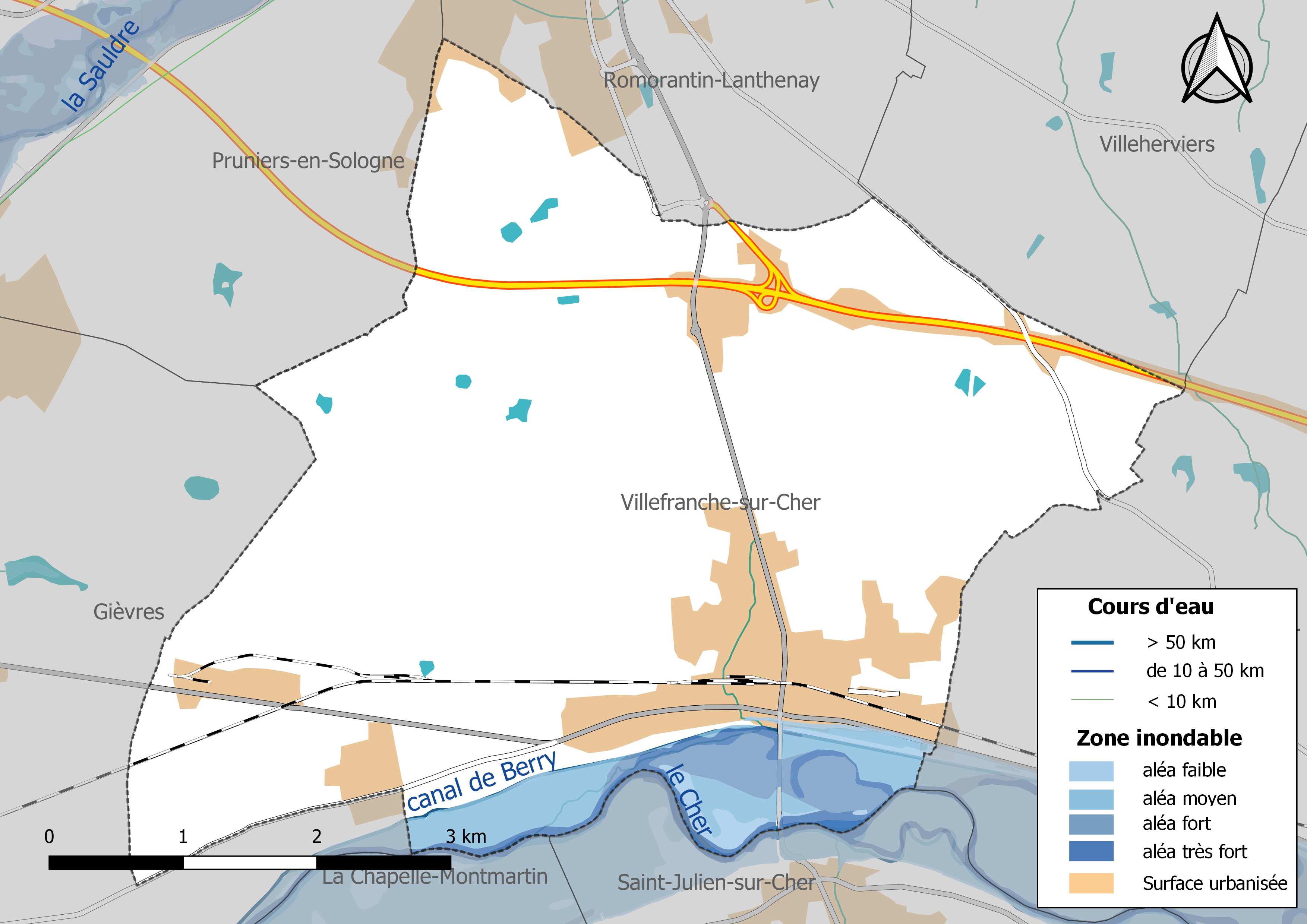 Carte des zones inondables de la commune de Villefranche-sur-Cher (France).